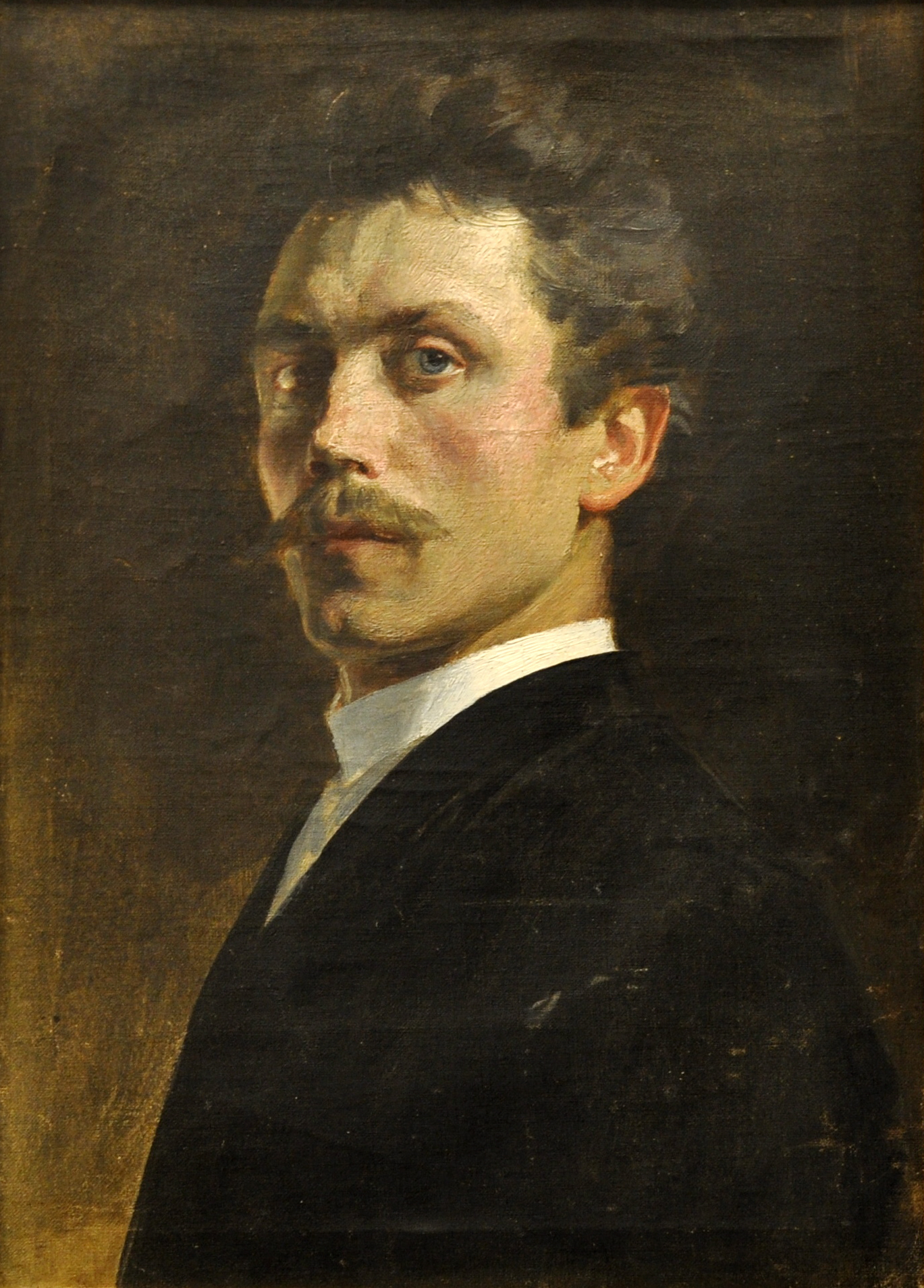 Selbstbildnis Gebhard Fugel, Ölgemälde, 1890, Privatbeistz